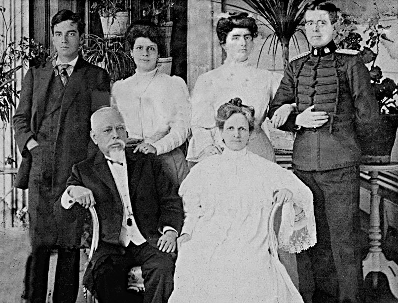 Familia del general Eloy Alfaro Delgado (presidente de Ecuador). Quito, circa 1908. Delante: Eloy Alfaro Delgado, Ana Paredes de Alfaro. Atrás (izquierda a derecha): Colón Eloy Alfaro Paredes, Colombia Alfaro Paredes, América Alfaro Paredes, Olmedo Alfaro Paredes